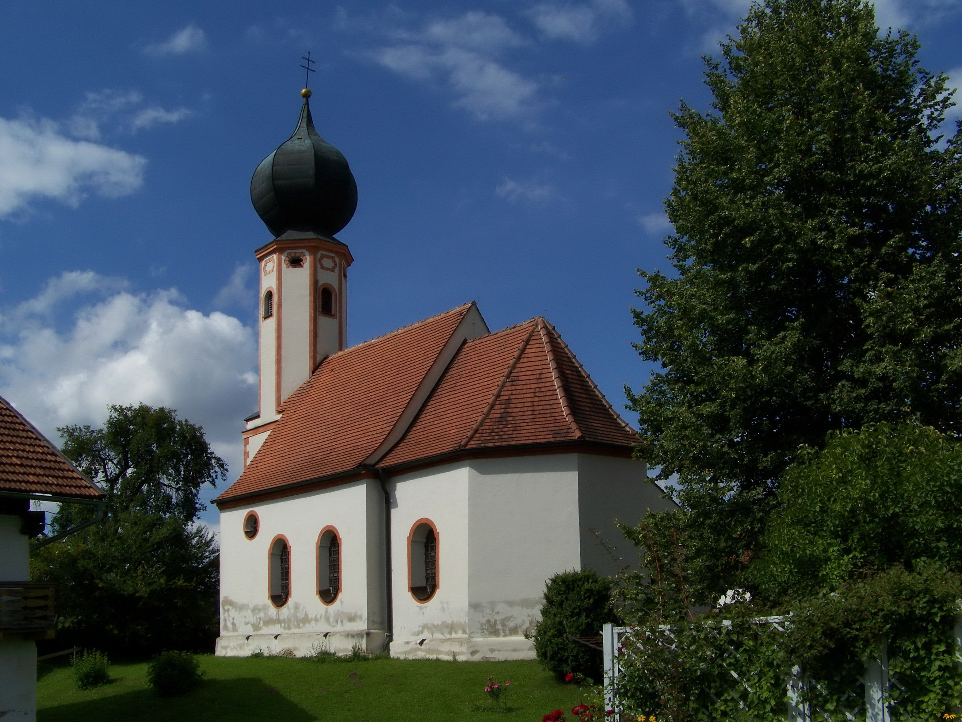 Göttersdorf, katholische Filialkirche St. Elisabeth, einheitlicher barocker Saalbau mit eingezogenem Chor und Westturm, 1692; mit Ausstattung.